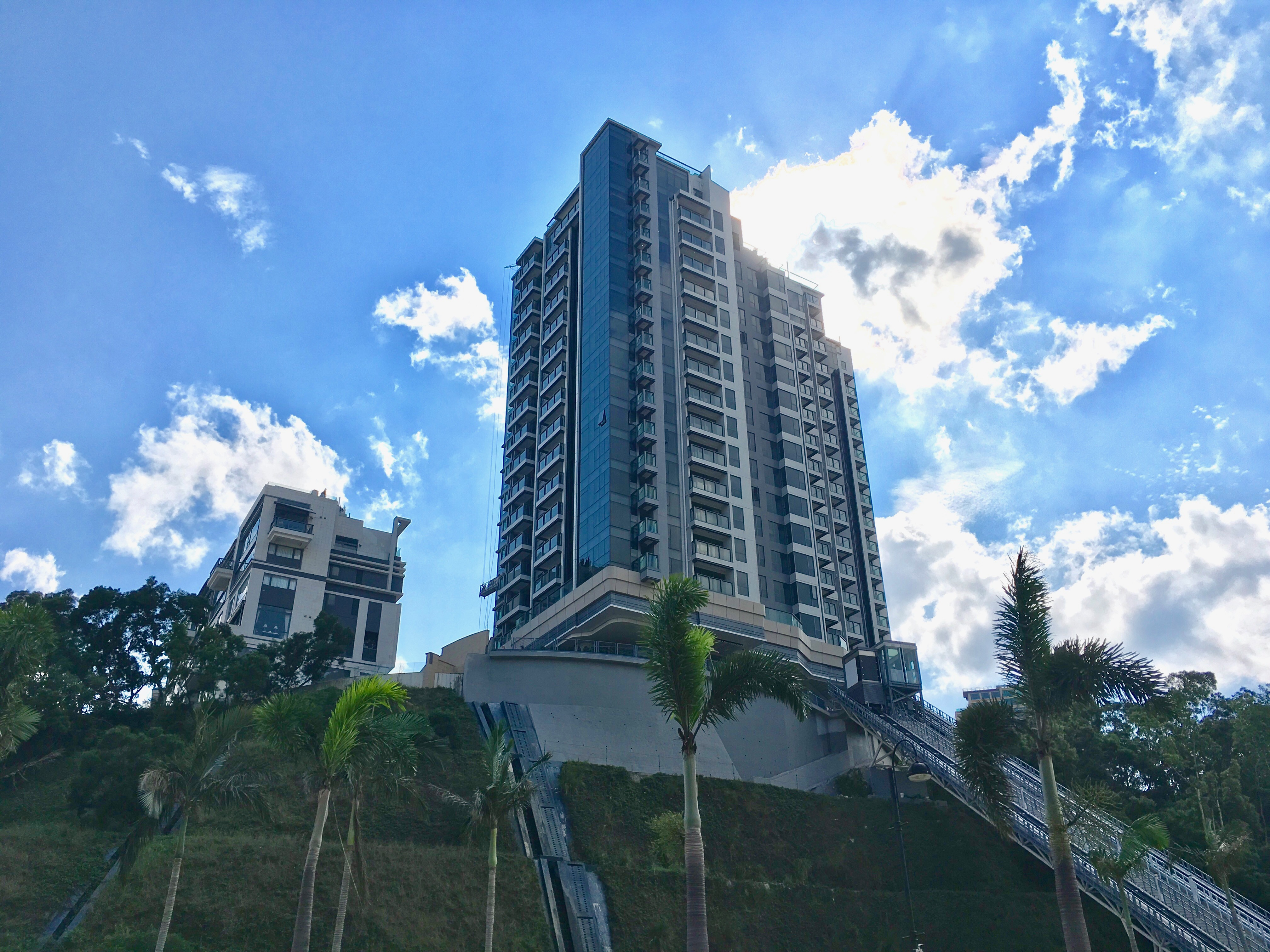 中文（香港）: 意堤Poggibonsi